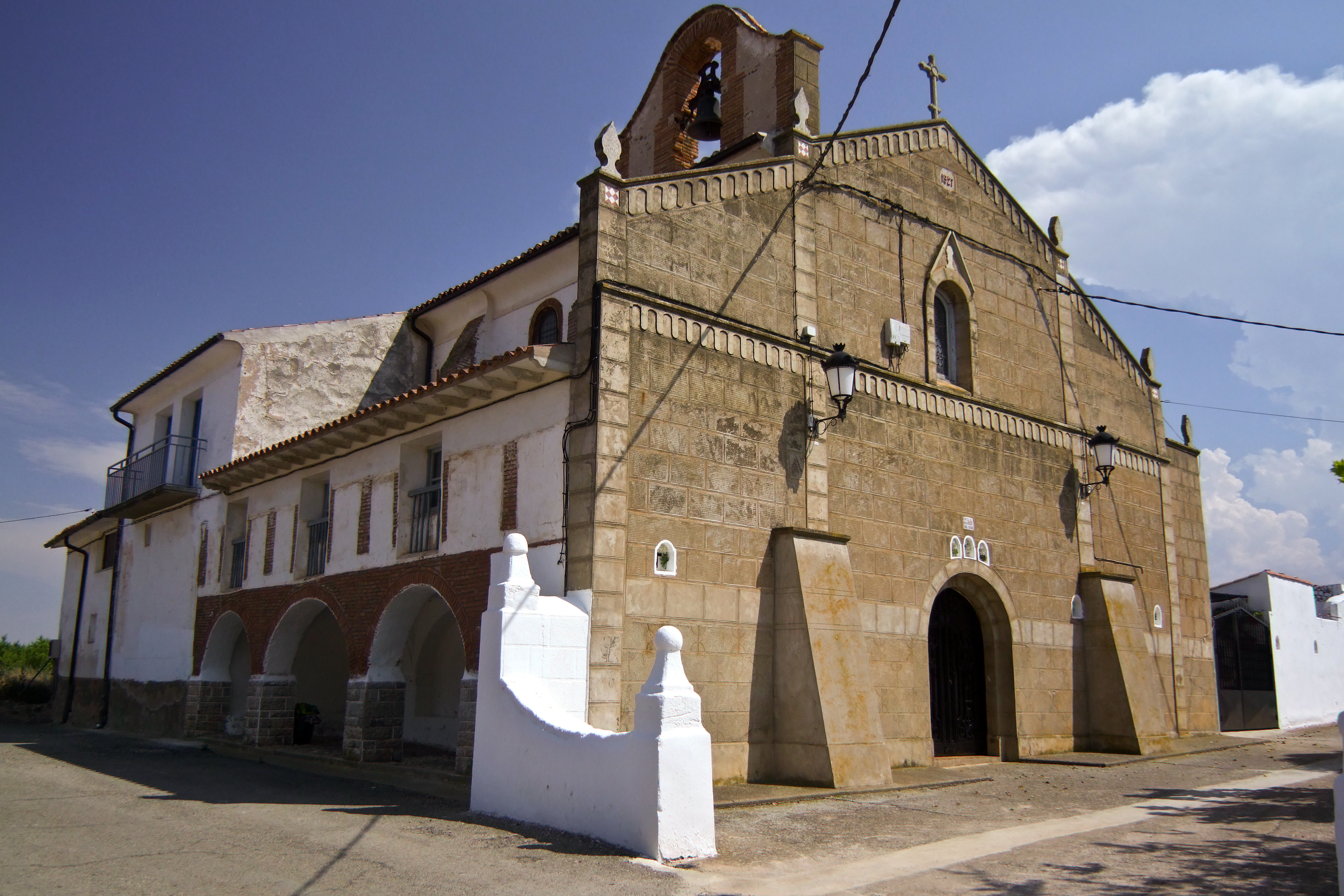 Ermita de la Transfiguración en la localidad de Quel, La Rioja - España